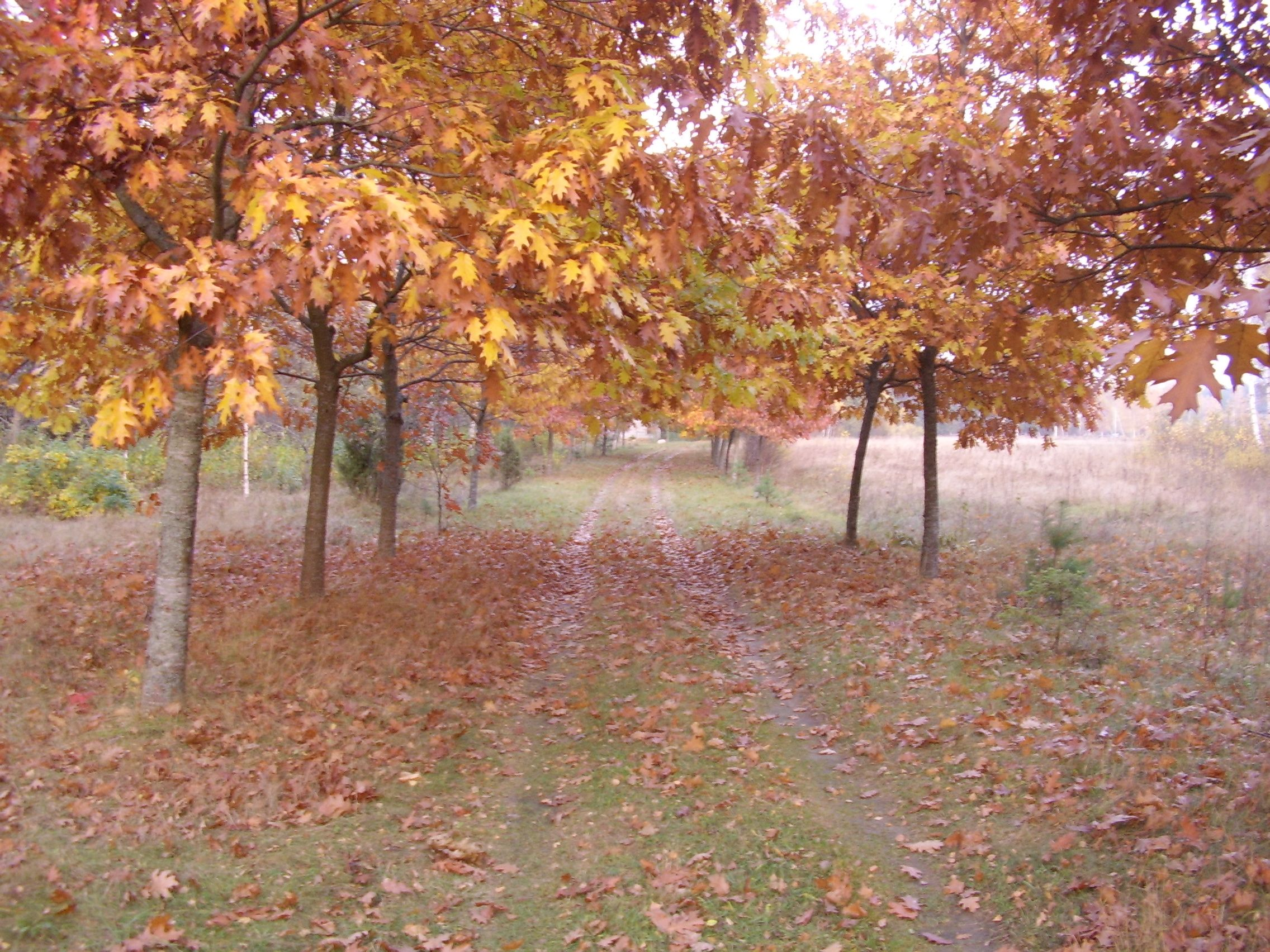 Ąžuolų alėja rašytojui P.RAŠČIUI atminti Puvočių kaime. Autorius zove.mykolas